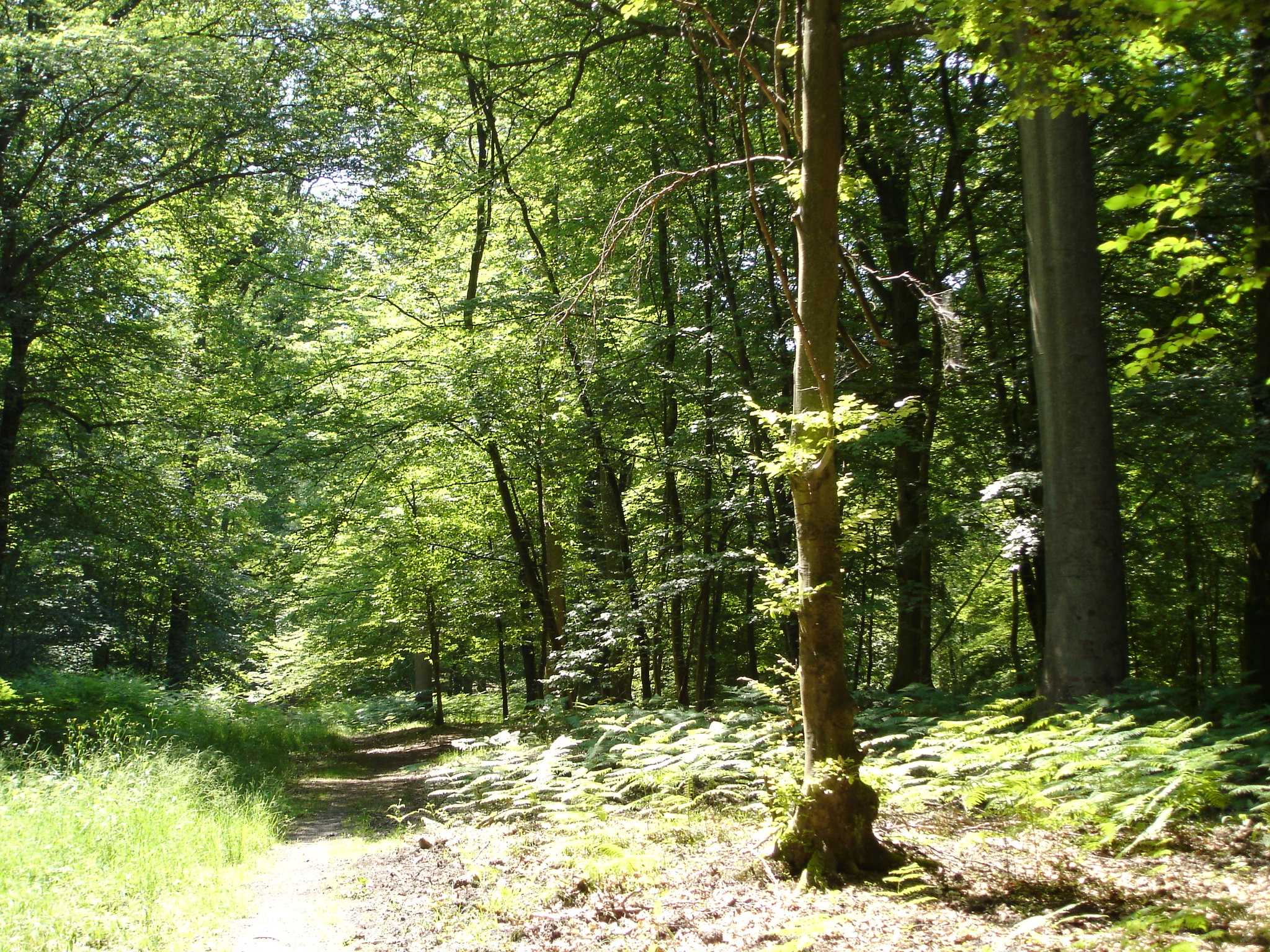 Sur le GR 12A en forêt de Laigue, entre Tracy-le-Mont et Saint-Crépin-aux-Bois -- Photo amateur prise par moi-même